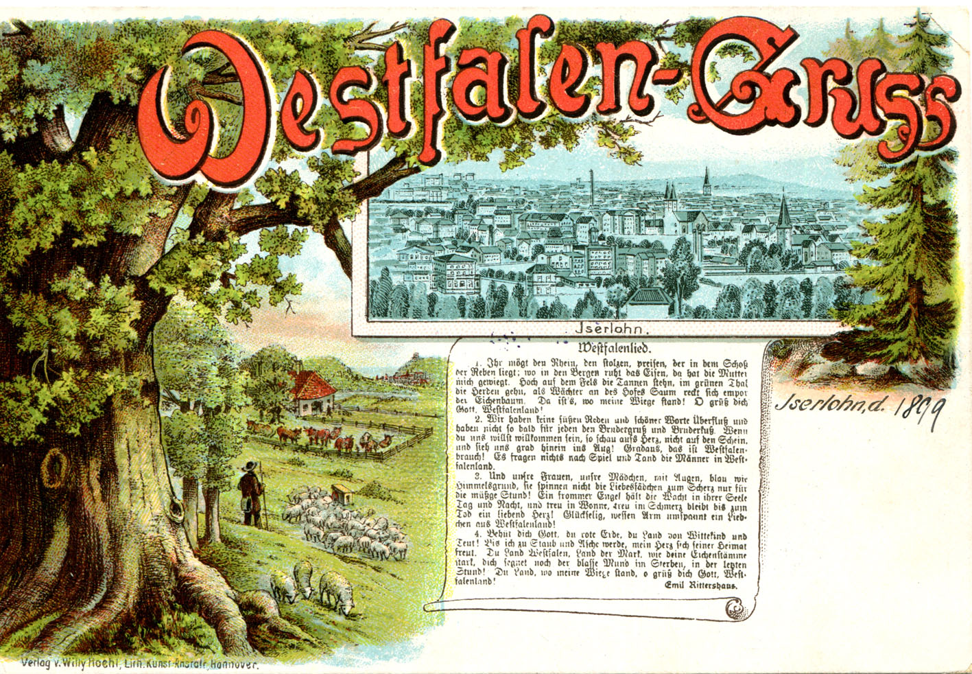 Handschriftlich 1899 datierte Lithographie mit einer Vedute der Stadt Iserlohn und einem „Westfalen-Gruss“ darunter der Text mit den vier Strophen des von dem Dichter Emil Rittershaus verfassten Westfalenliedes ...